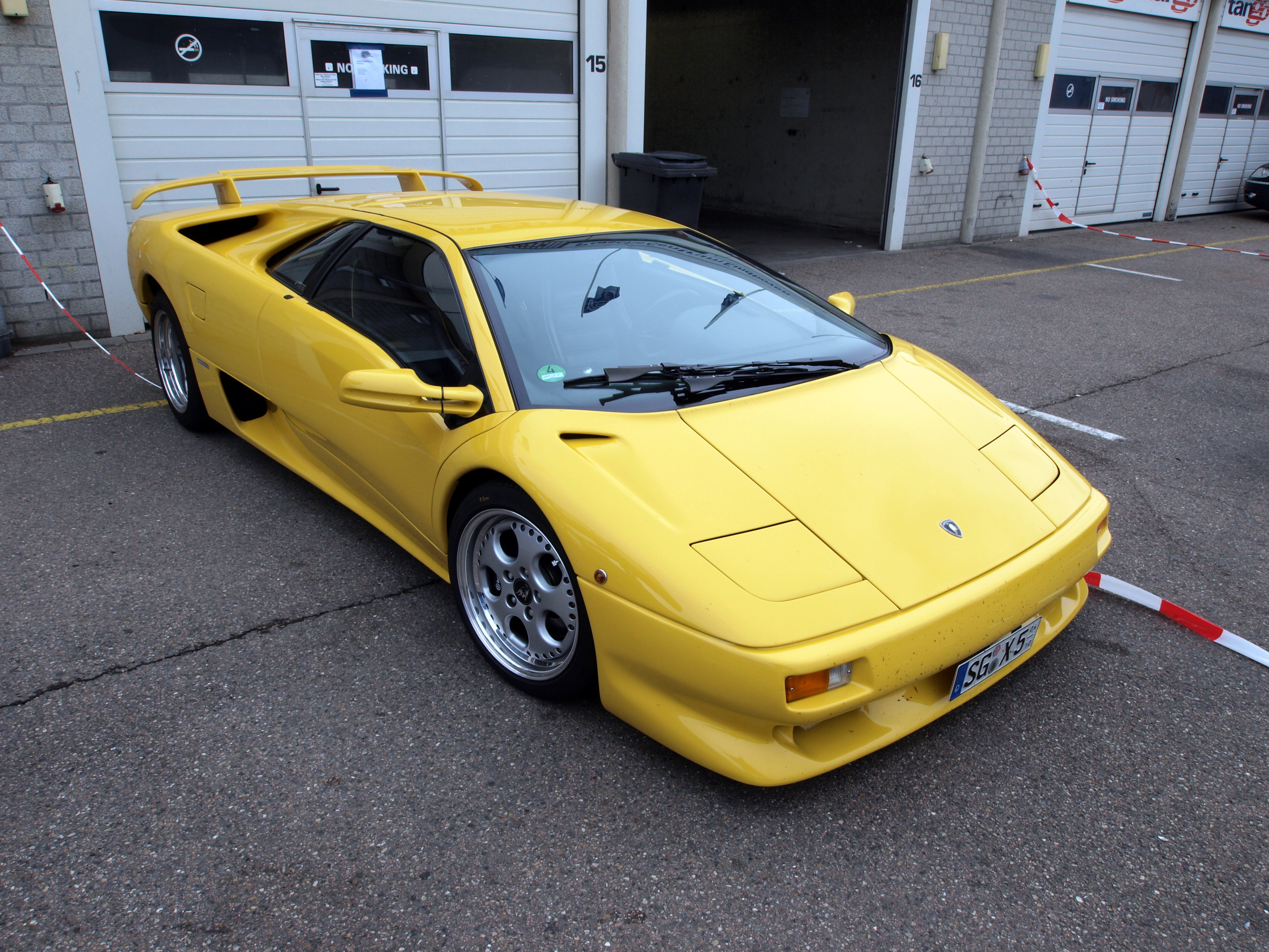 Nationaal Oldtimer Festival Zandvoort 2011.